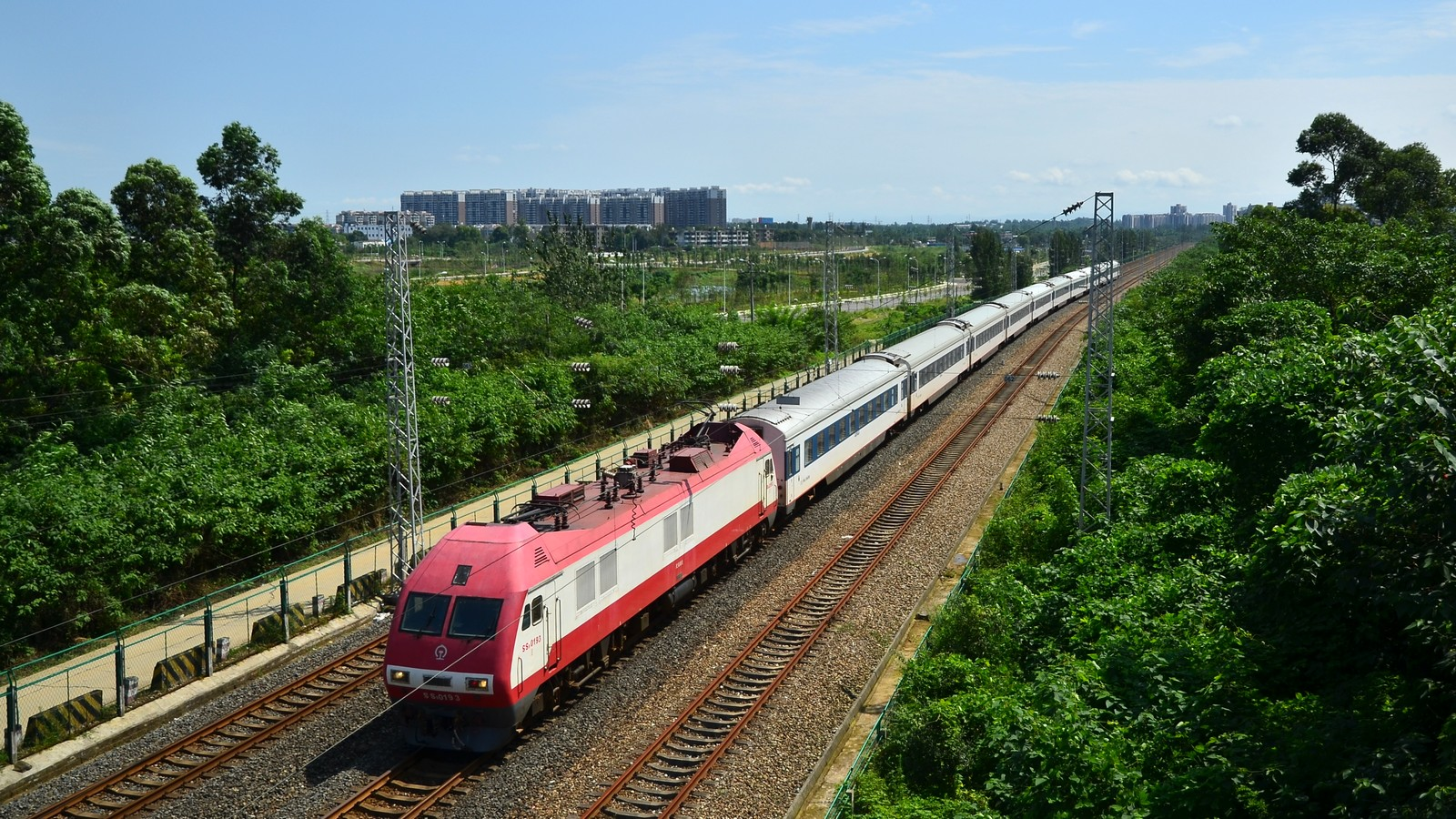 三环路龙潭跨线桥-Z123